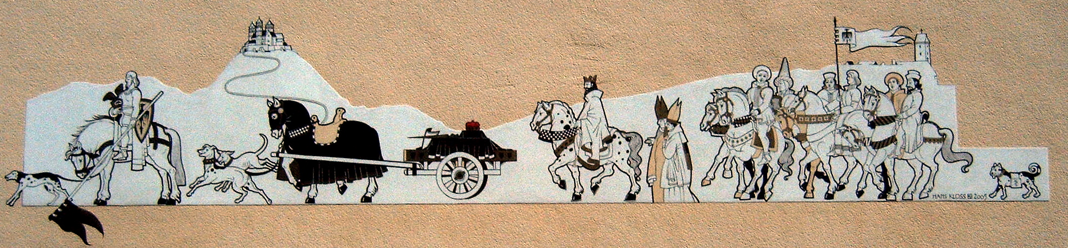 Umbettung von Friedrich I., Wandmalerei von Hans Kloss, 2005, in Lorch, Kirchstraße. Siehe auch Erläuterung unter Bild:Umbettung Friedrich I. Erläuterung.jpg